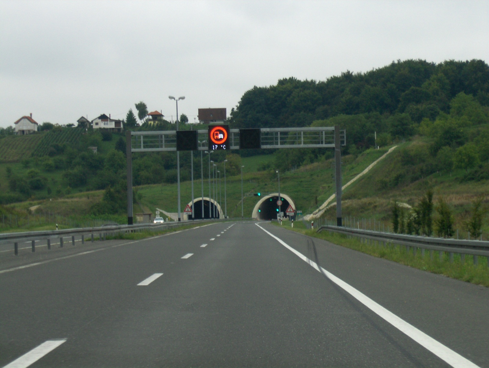 A4 Vrtlinovec tunnel